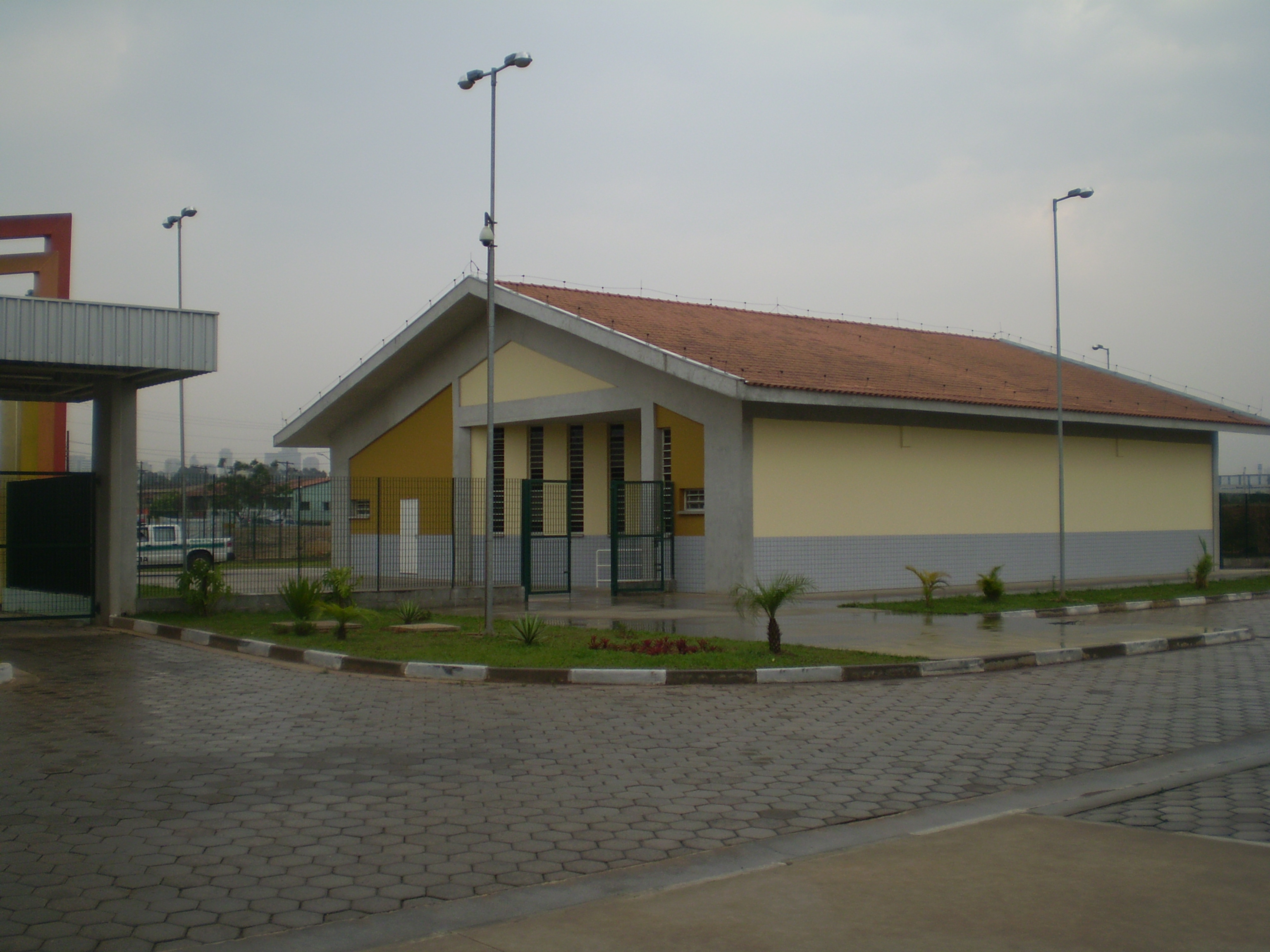 Foto do auditório da Faculdade de Tecnologia - Carapicuíba